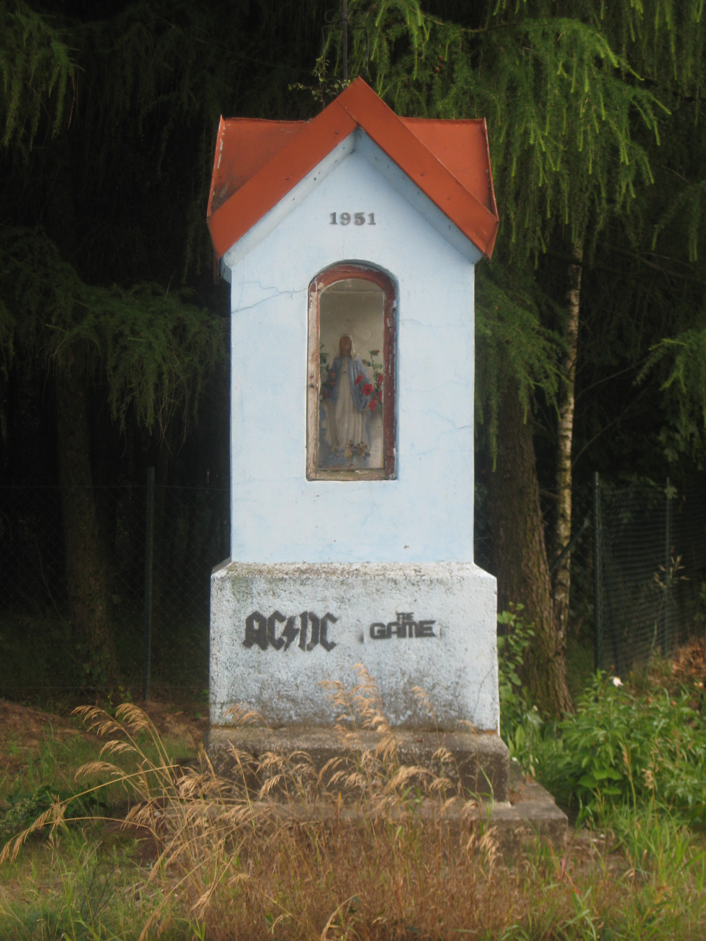 Kapliczka w północnej części wsi Powązki